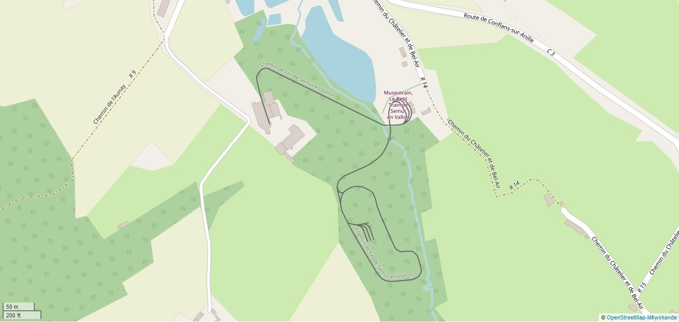 Compagnie du Chemin de Fer de Semur en Vallon (OpenStreetMap)